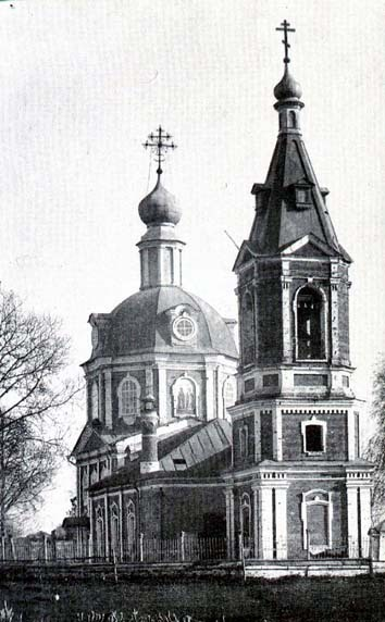 Dmitrov_Preobrazhenskaja-ili-Nikitskaja_Church